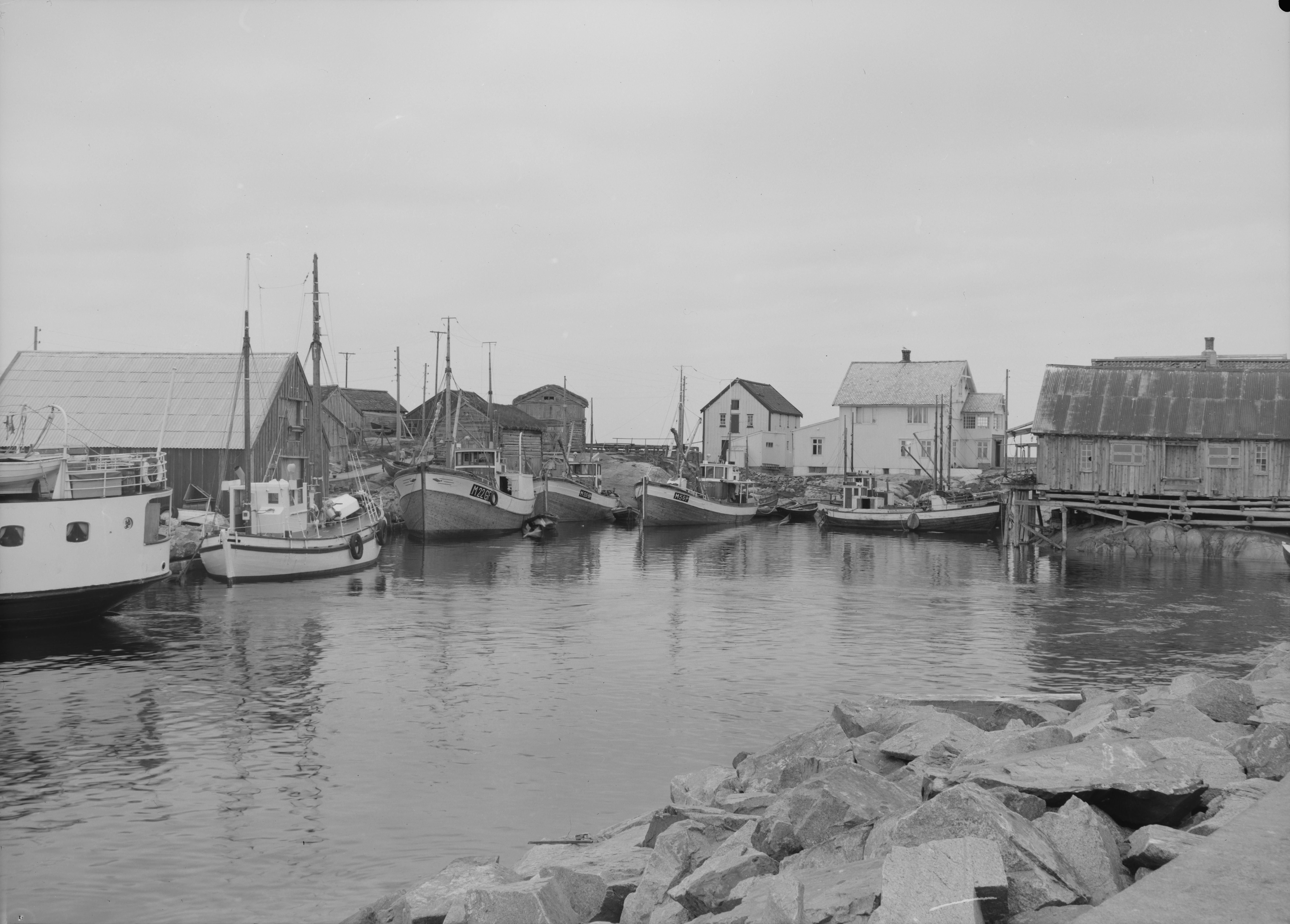 Bildet er hentet fra Nasjonalbibliotekets bildesamling. Anmerkninger til bildet var: Fotograf: E_KQ Grip, Kristiansund, Møre og Romsdal